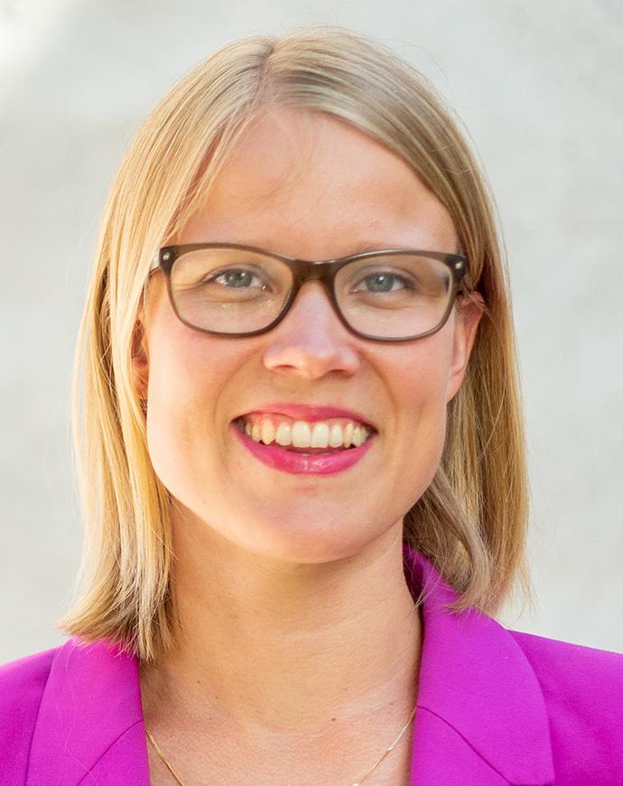 Kristina Yngwe, Riksdagsledamot för Centerpartiet.